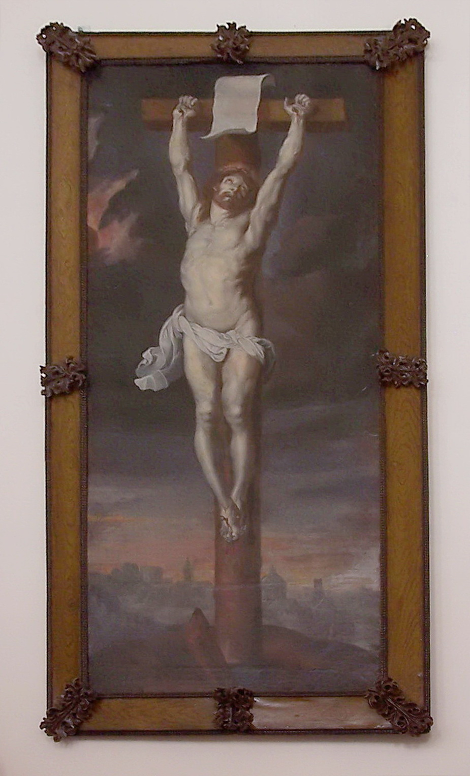 Schlosskapelle Wörth an der Donau. Unvollendetes Gemälde eines Kreuzes ohne beschrifteten Titulus im Stil eines jansenistischen Christus. Das ist die Bezeichnung für die Gestaltung des gekreuzigten Christus mit empor gestreckten statt der sonst üblichen ausgebreiteten Arme. Die Darstellung geht auf Cornelius Jansen (Jansenismus) zurück und war von der katholischen Kirche zeitweise verboten. Die enge Armstellung soll die enge Pforte in den Himmel symbolisieren. "Eher geht ein Kamel durch ein Nadelöhr, als dass ein Reicher in den Himmel kommt." Der Maler ist unbekannt.